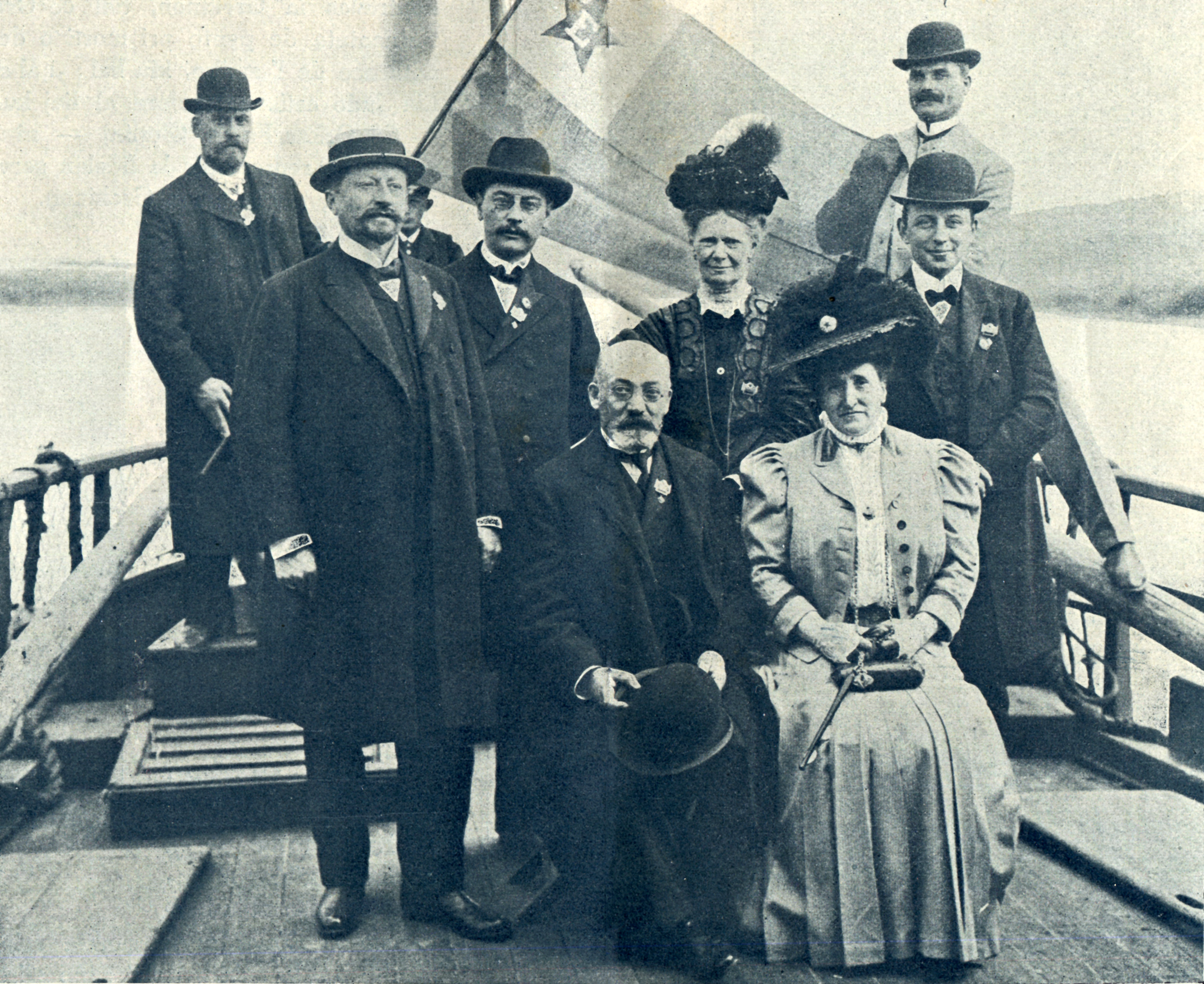 UK 1908. La gesinjoroj Zamenhof kun la Kvaro por la Kvara